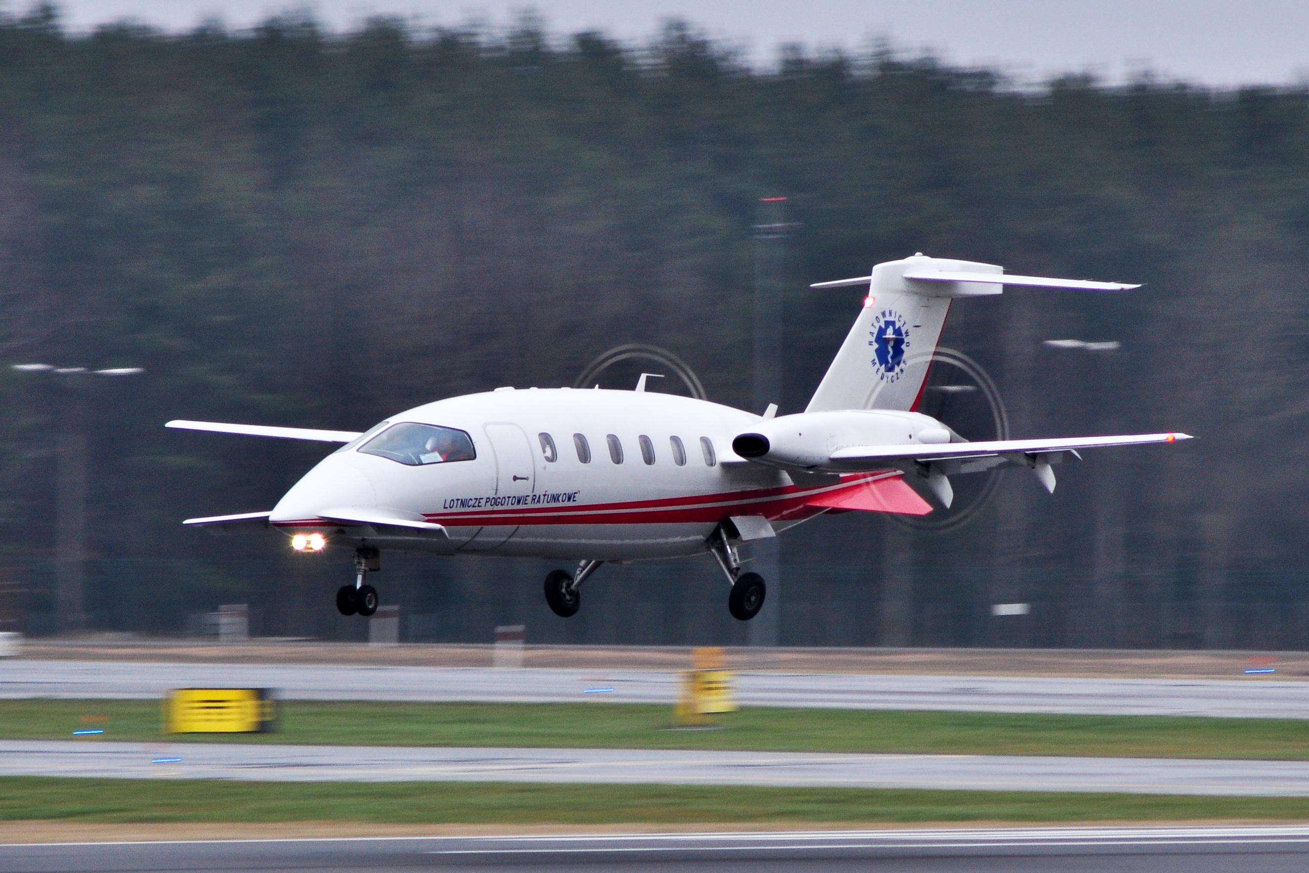 Gdańsk, Lech Walesa Airport, Lotnicze Pogotowie Ratunkowe.